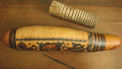 Imagen del instrumento llamado "Macumba".